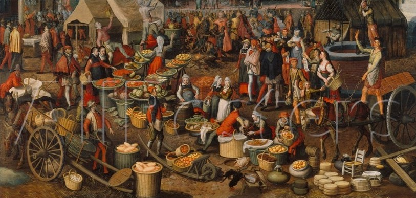 Pilatus erscheint mit Jesus auf einem belebten Markt, und ruft seine Unschuld als "Ecce Homo" heraus. Die Menge rebelliert dagegen.